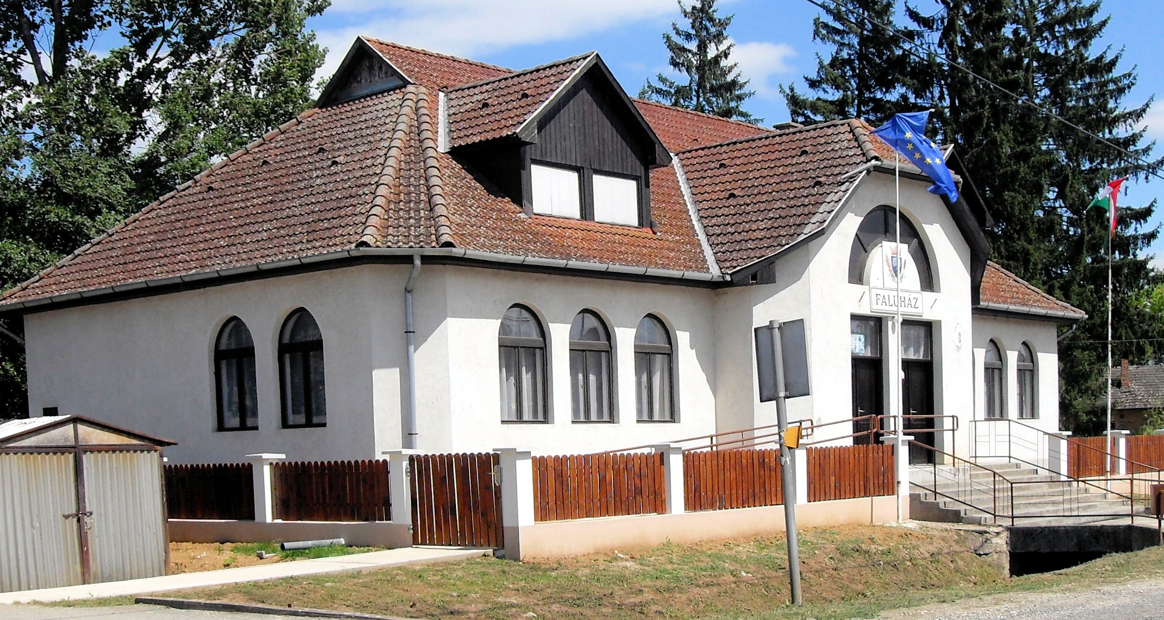 Községi hivatal Viszló